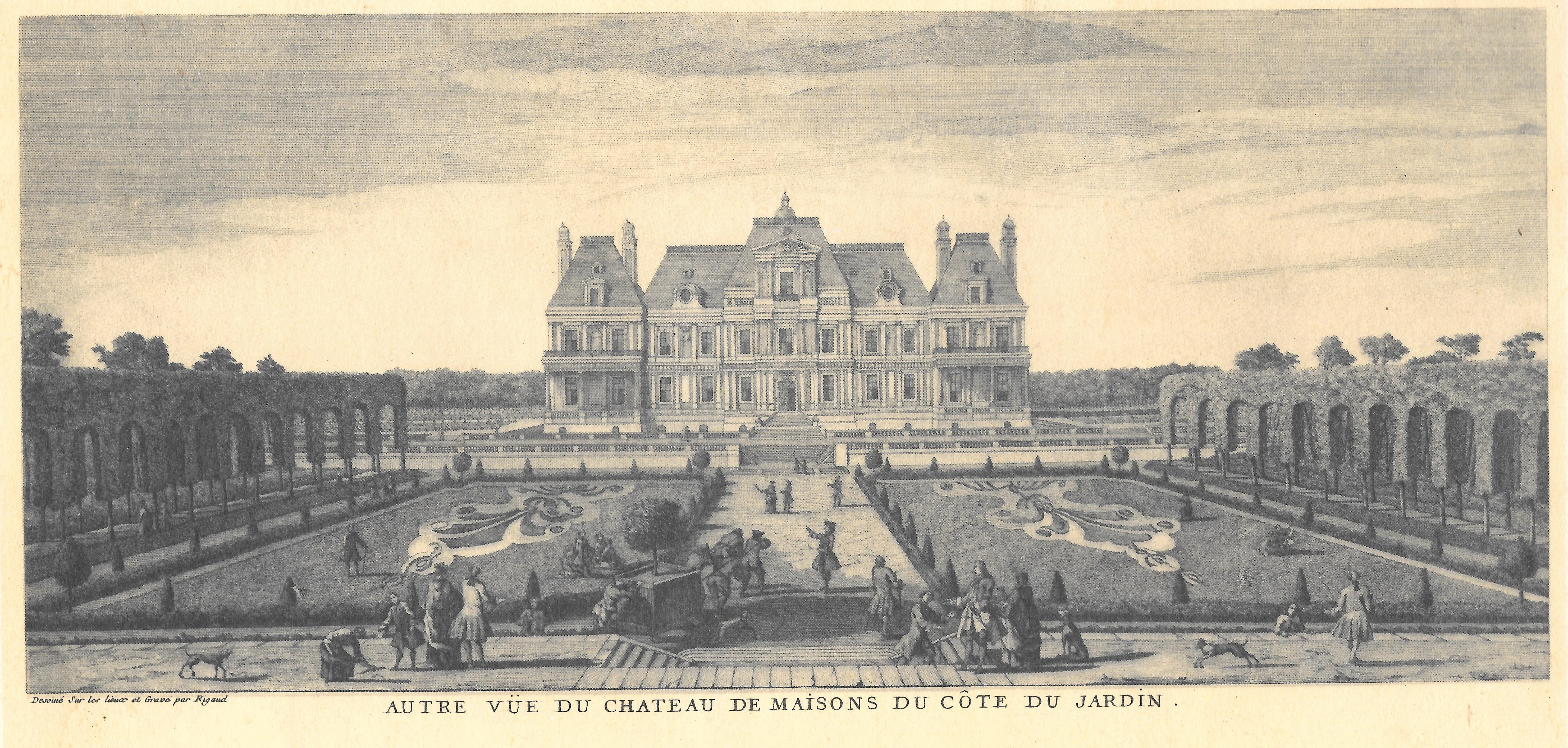 Gravure du Château de Maisons-Laffitte